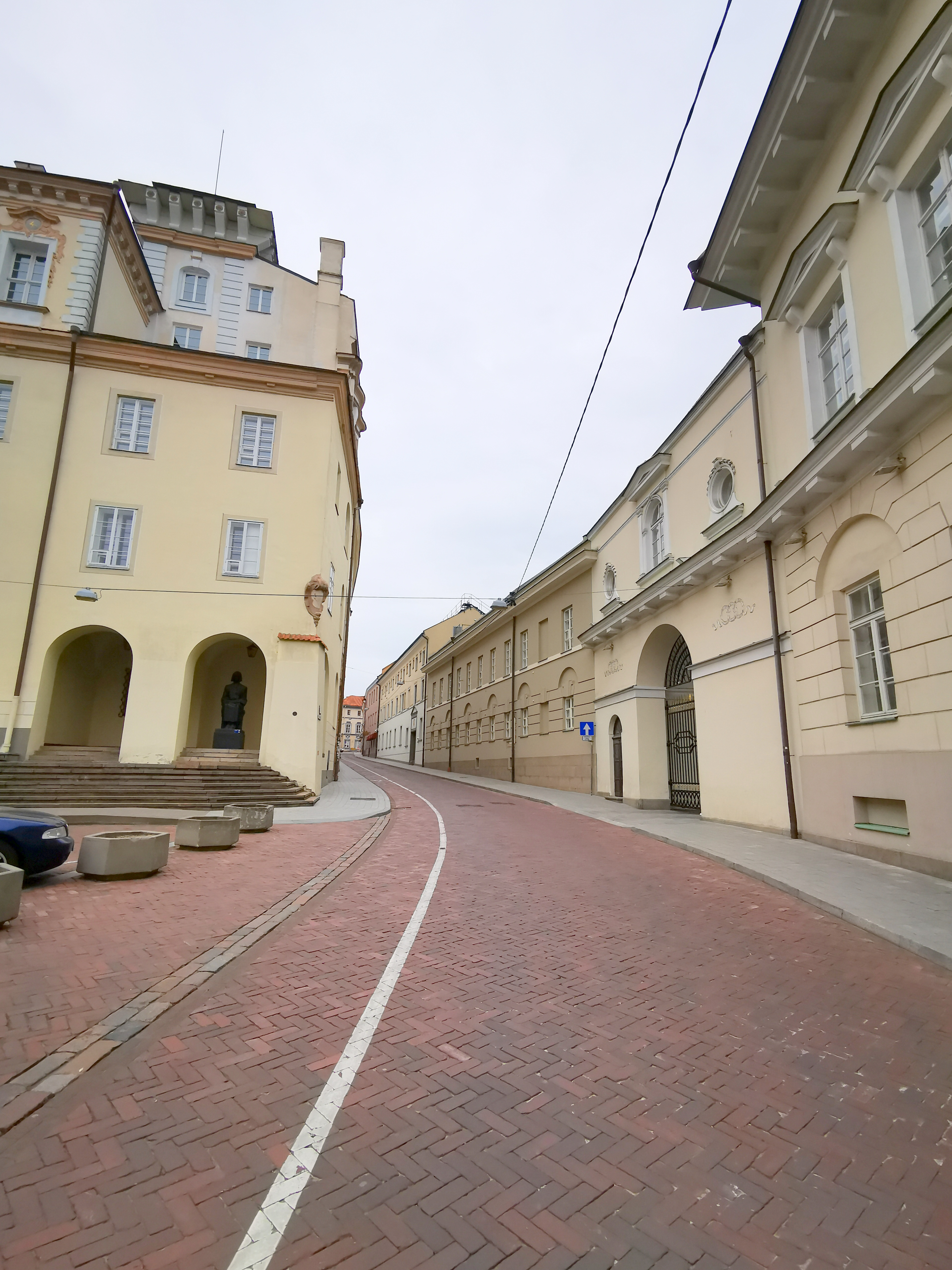 Universiteto gatvė